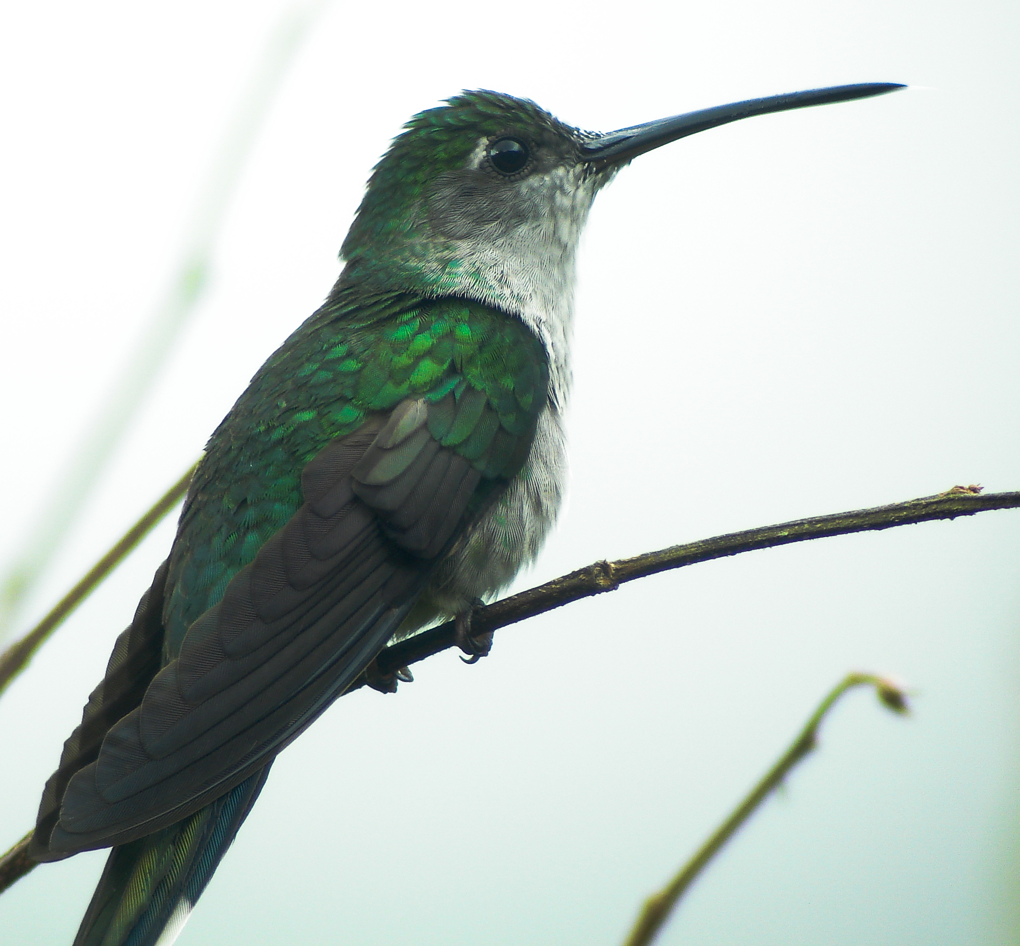 Bearbeitung von "Datei:Unbekannter kolibri.jpg"